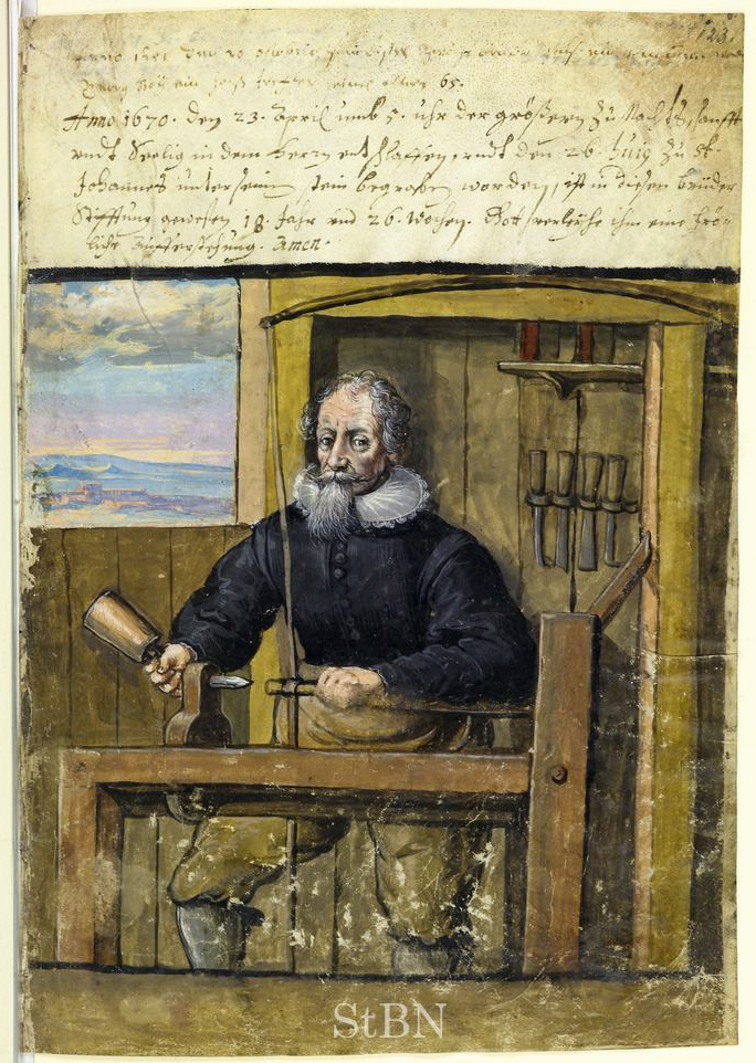 Transkription und weitere Informationen Georg Roth, holtz trechsler (Holzdrechsler; Drechsler)